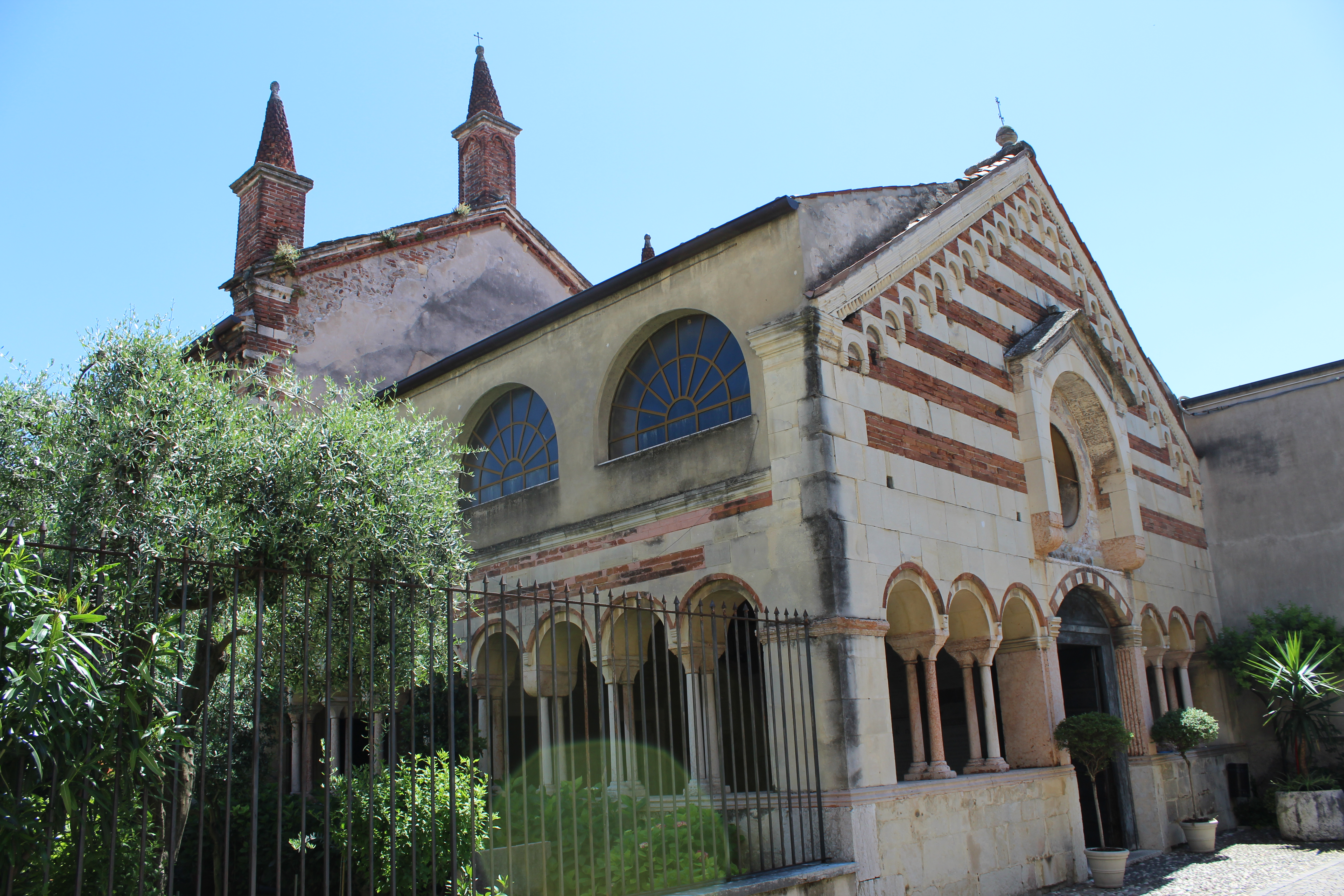 Chiesa della Santissima Trinità in Monte Oliveto (Verona)